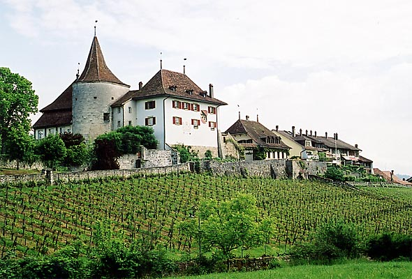 Altstadt von Erlach, im Vordergrund das Schloss